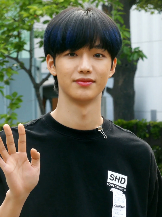 31일 오전 서울시 영등포구 여의도 KBS 신관 공개홀에서 열린 '뮤직뱅크' 리허설에 참석하기 위해 AB6IX(이대휘, 박우진, 임영민, 김동현, 전웅)가 출근하고 있다. 한편 뮤직뱅크는 31일 오늘 생방송은 결방하고 다음주 6월 7일 녹화방송된다. AB6IX #에이비식스 #이대휘 #LEEDAEHWI #뮤직뱅크 #출근길, AB6IX, 에이비식스, 이대휘, 박우진, 임영민, 김동현, 전웅, 뮤직뱅크, 뮤뱅, 뮤뱅출근길, MUSICBANK, 출근길